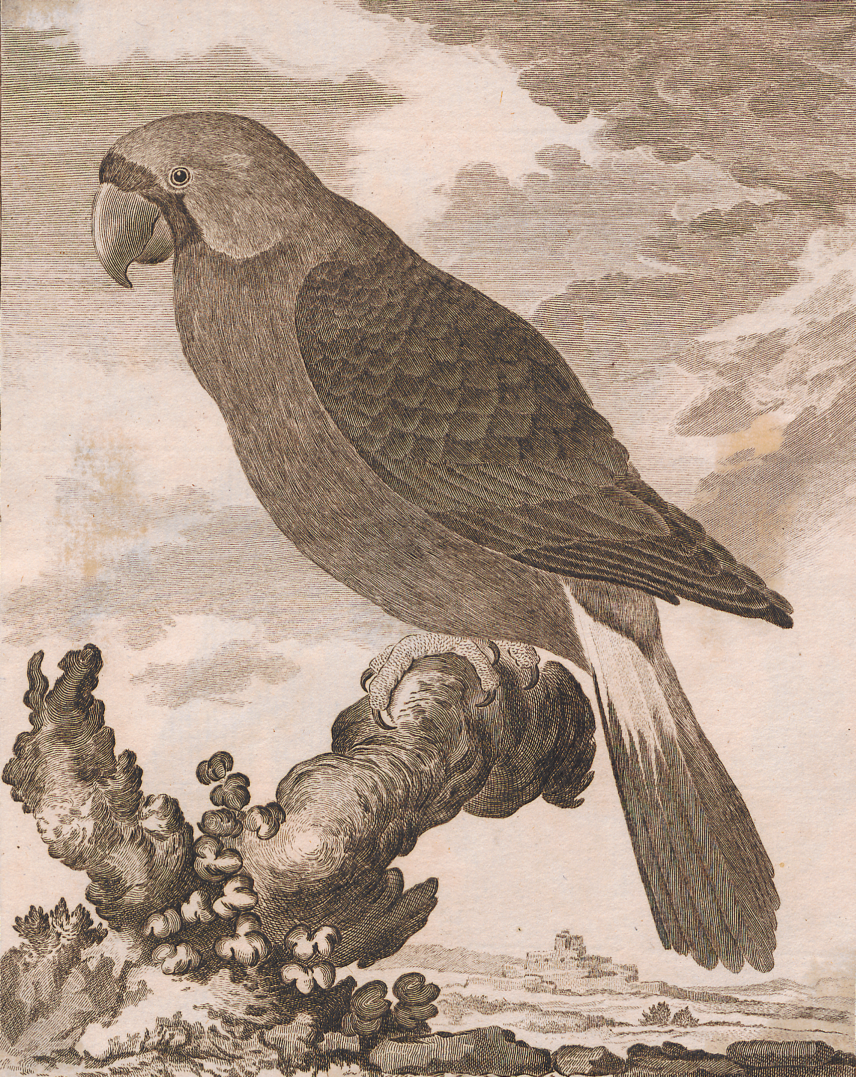 Histoire naturelle, generale et particulieÌre, avec la description du Cabinet du roy, Volume XXI. By Georges Louis Leclerc comte de Buffon, (1707-1788), Louis Jean Marie Daubenton, (1716-1799), M. le comte de La CepeÌde, (Bernard Germain Etienne de la Ville sur Illon), (1756-1825) & Philibert, GueÌneau de MontbeÌliard, (1720-1785). Published by De L'Imprimerie royale, Paris, France in 1749.